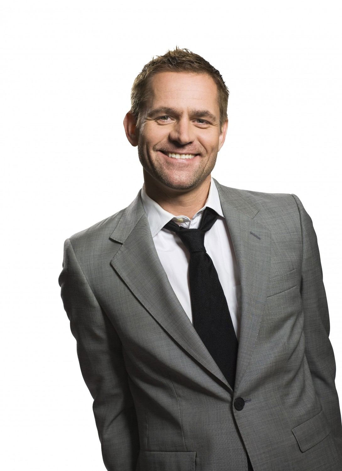 Programledaren Rickard Olsson